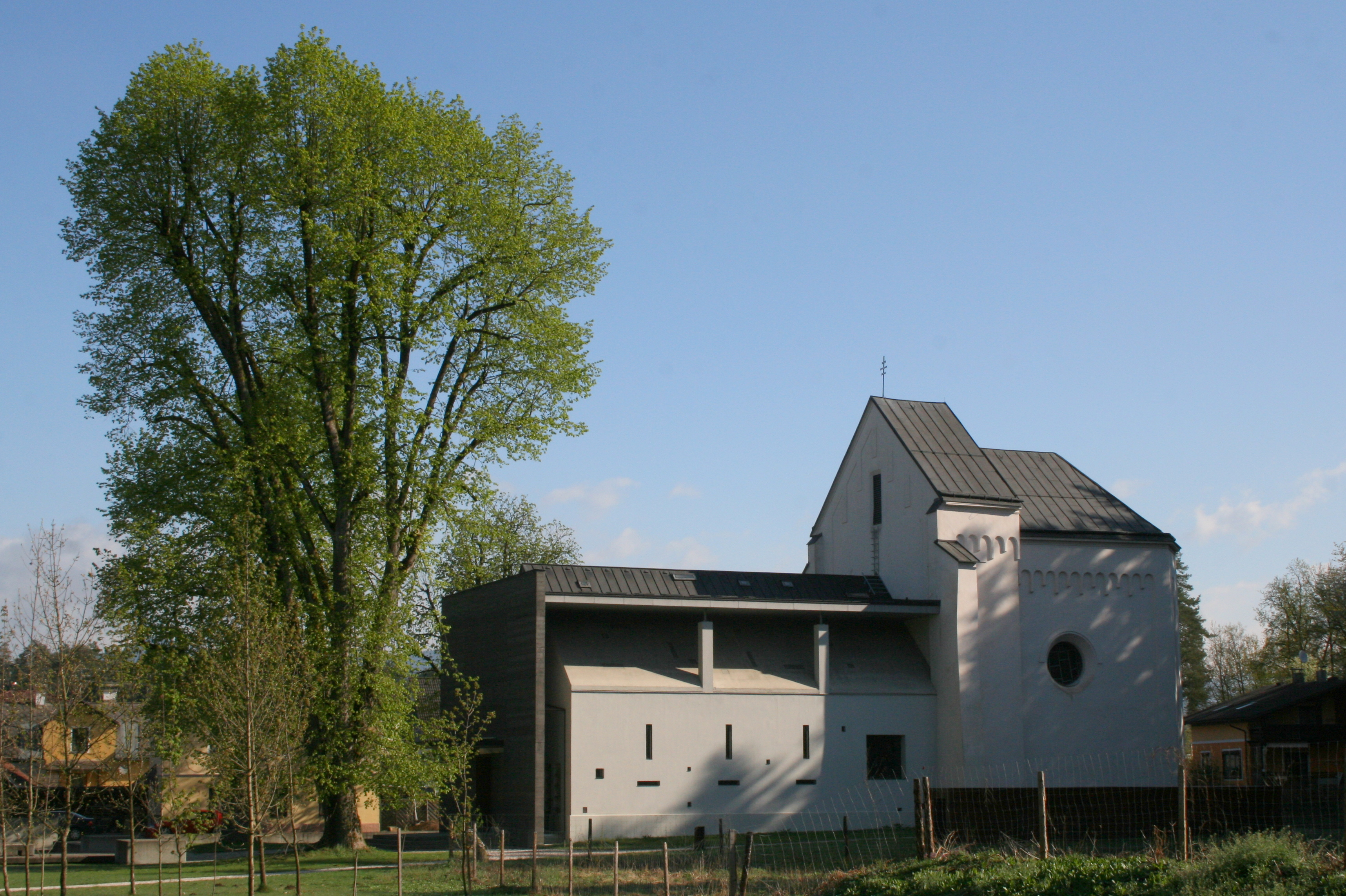 Autobahnkirche Dolina, Maria-im-Walde-Kirche Aussenansicht